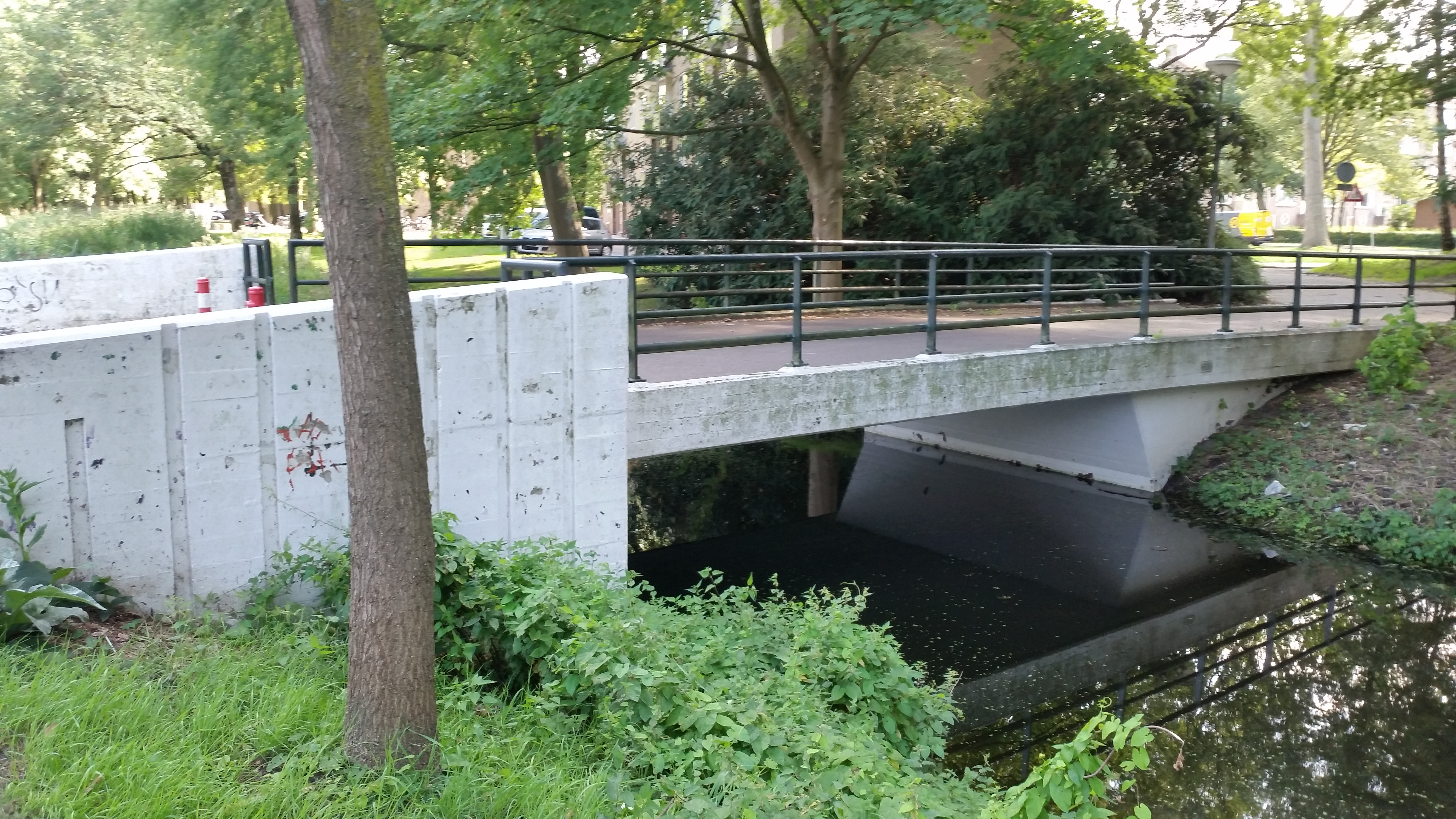 Brug 608 (in Amsterdam), zijaanzicht